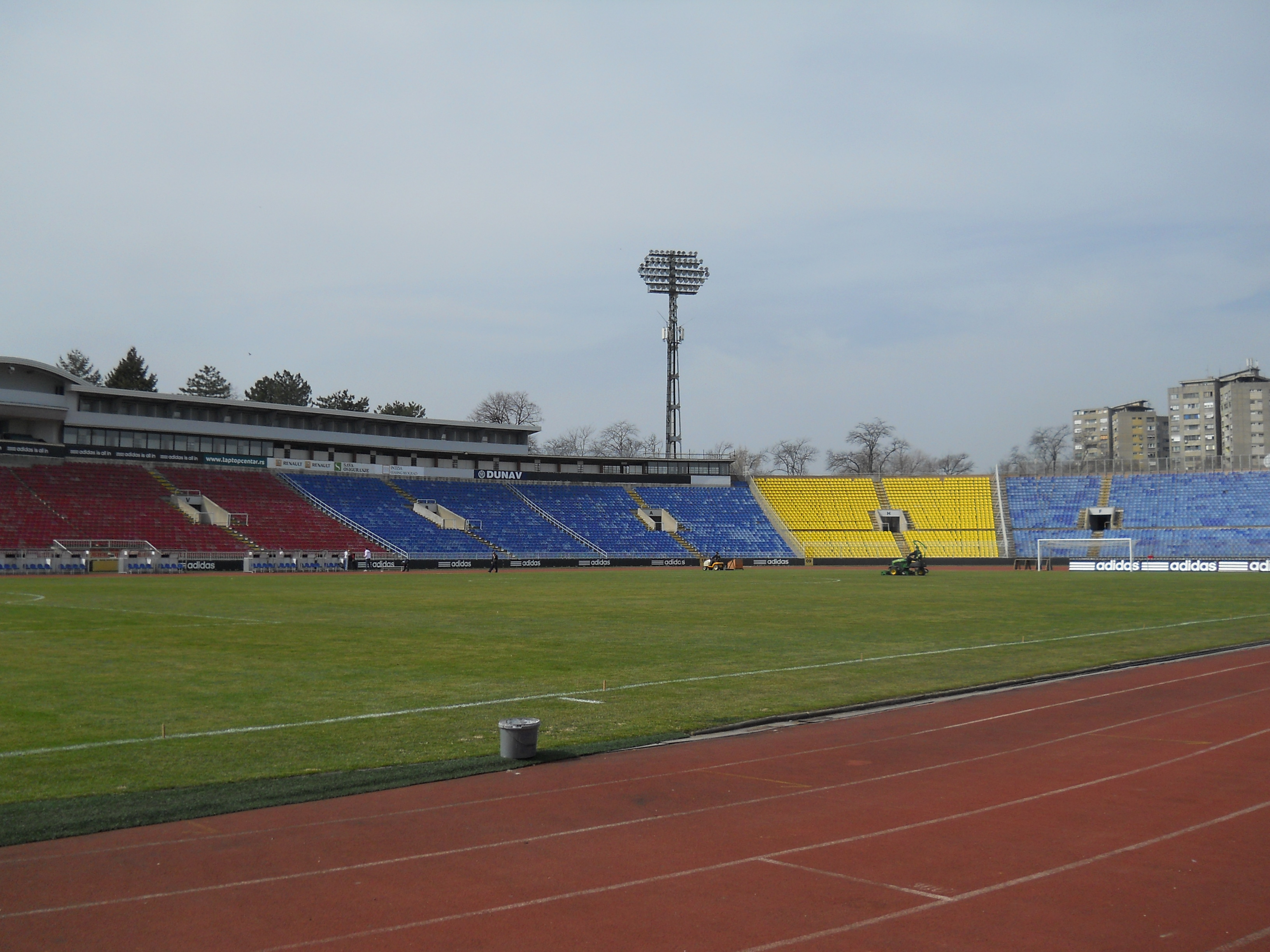 belgrade serbia fk partizan (11)